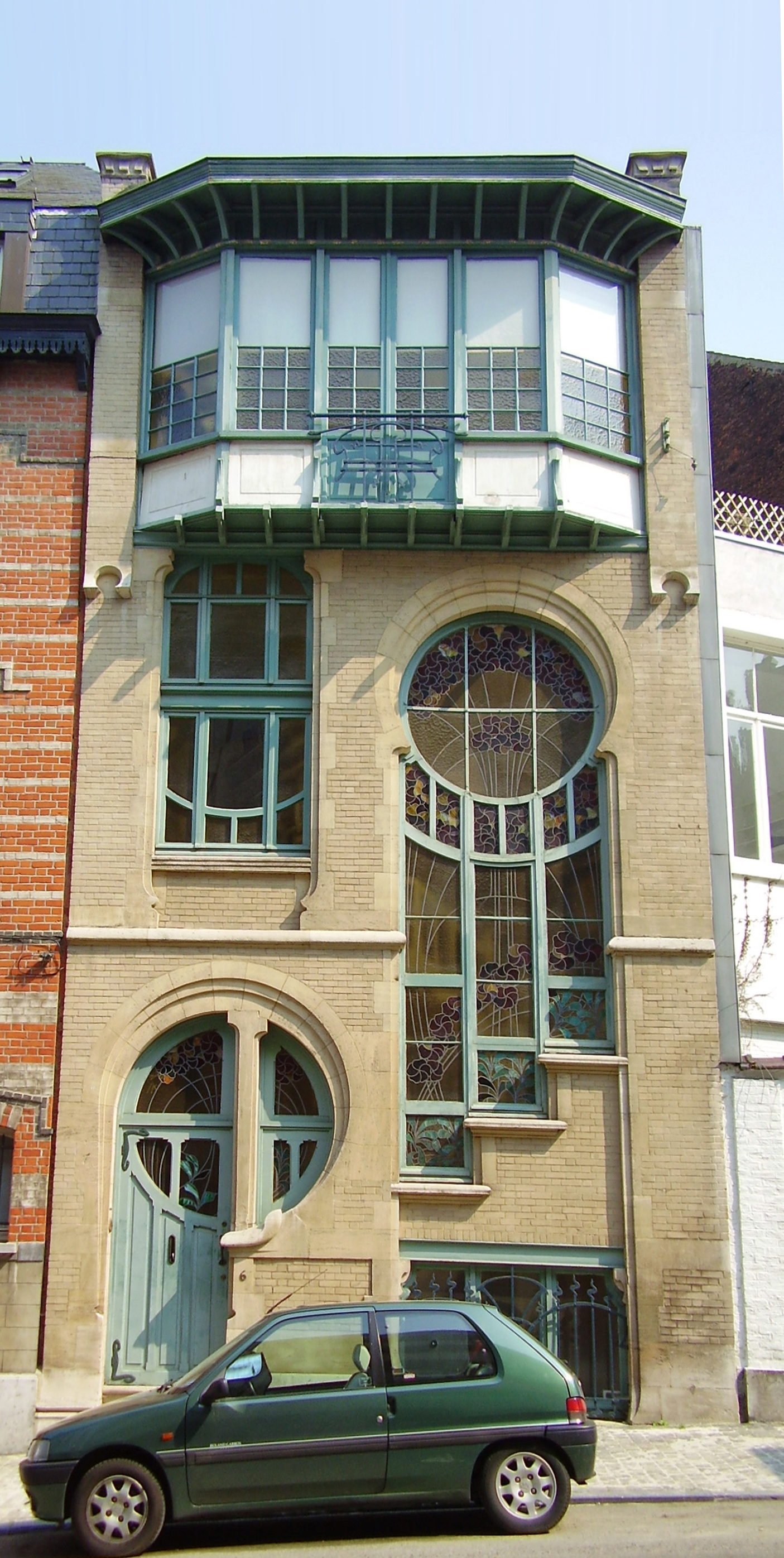 Architectes Léon et Ernest Delune (1904), rue du Lac,6 Ixelles (Bruxelles)